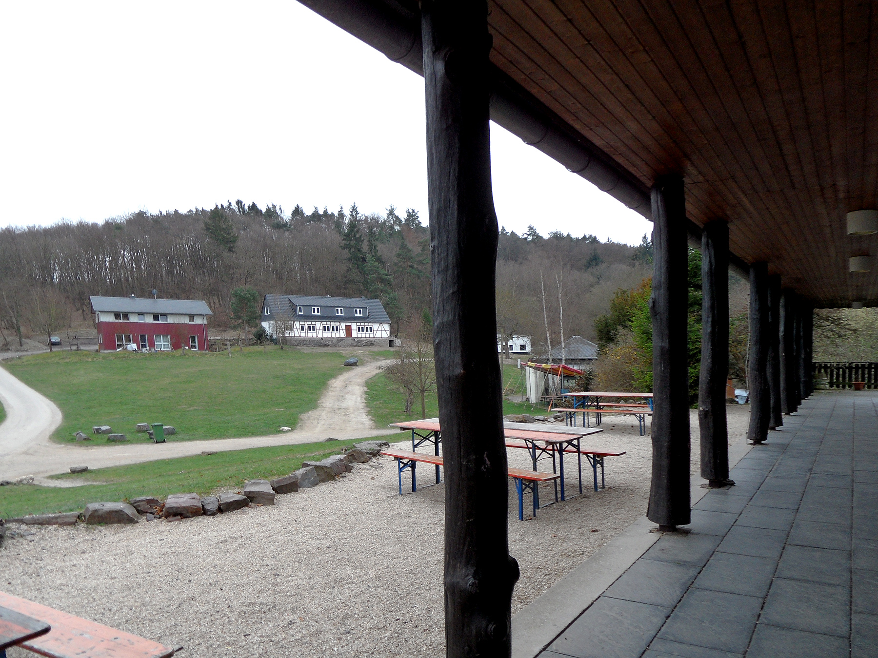 Säulenhaus Tagungshaus der Arbeitsgemeinschaft Burg Waldeck e. V. in 56290 Dorweiler/Hunsrück (Jugend-, Freizeit- und Bildungsstätte Burg Waldeck). Die ABW wurde 1934 gegründet, um das Eigentum des Nerother Wandervogels vor dem Zugriff des NS-Staates zu retten. Der nach dem Zweiten Weltkrieg fortgeführte Verein verwandelte die Burg Waldeck im Hunsrück in eine wichtige Kultur- und Begegnungsstätte mit regelmäßigen Konzertveranstaltungen. Ein studentischer Arbeitskreis der ABW initiierte und organisierte von 1964 bis 1969 die Burg-Waldeck-Festivals, die ersten Open-Air-Festivals in Deutschland. Hier hatte u.a. Franz Josef Degenhardt seinen ersten öffentlichen Auftritt; außerdem traten u.a. traten Reinhard Mey, Hannes Wader, Phil Ochs, Guy Caravan, Dieter Süverkrüp, der Kabarettist Hanns Dieter Hüsch und der Schriftsteller Erich Fried hier auf. Auch heute finden hier regelmäßig Liederfeste und Workshops statt, die Räume stehen aber auch interessierten Jugendgruppen für andere Aktivitäten offen.